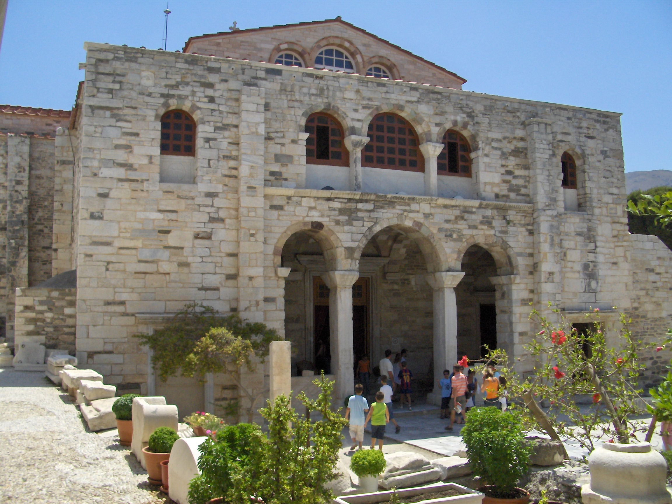 Η εκκλησία Παναγία η Εκατονταπυλιανή στην Πάρο.